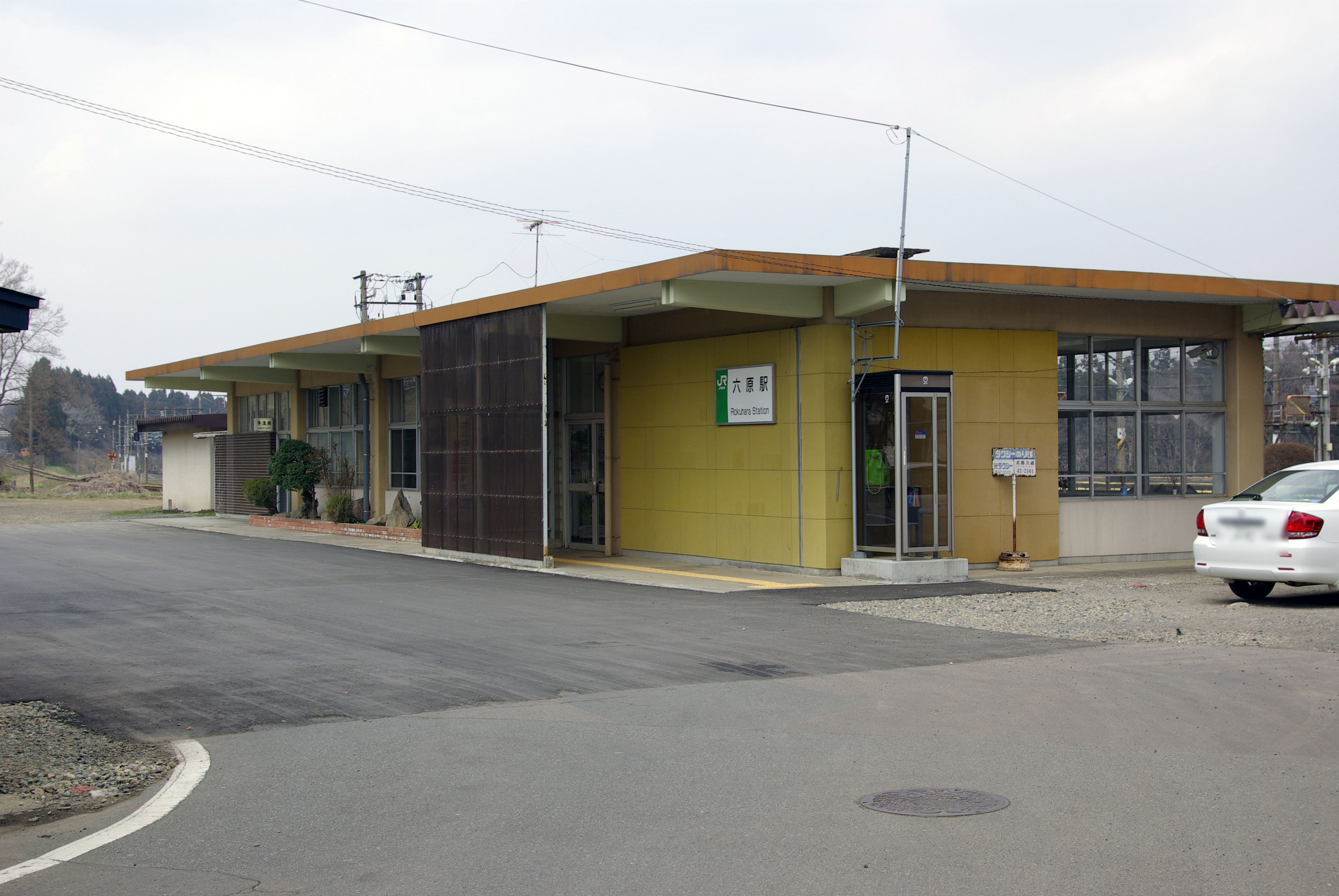 JR東北本線六原駅